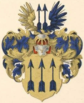 Pfeilitzer gen. Francki suguvõsa aadli- ja parunivapp